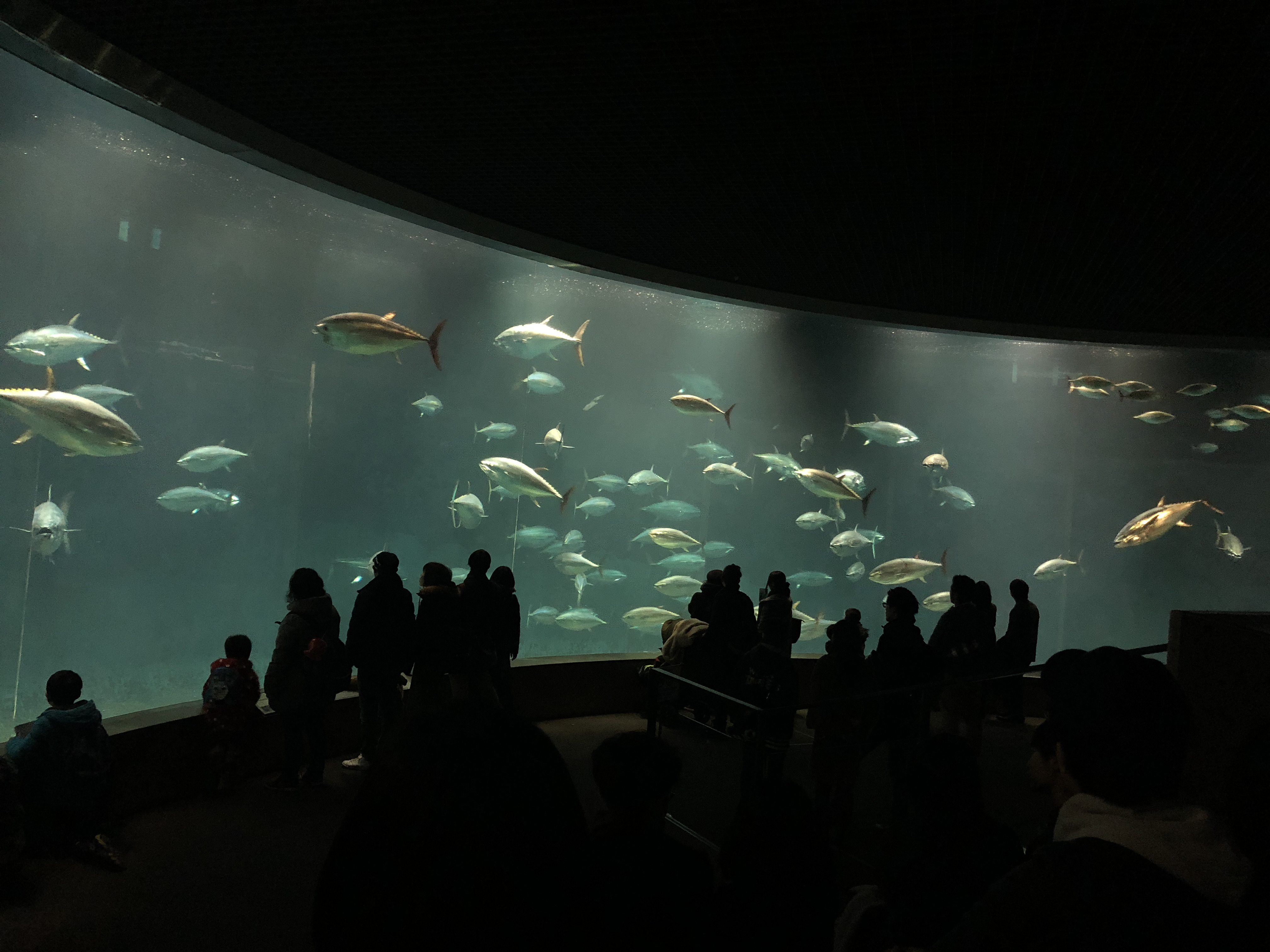 Tunas in Kasai Auarium, Tokyo.